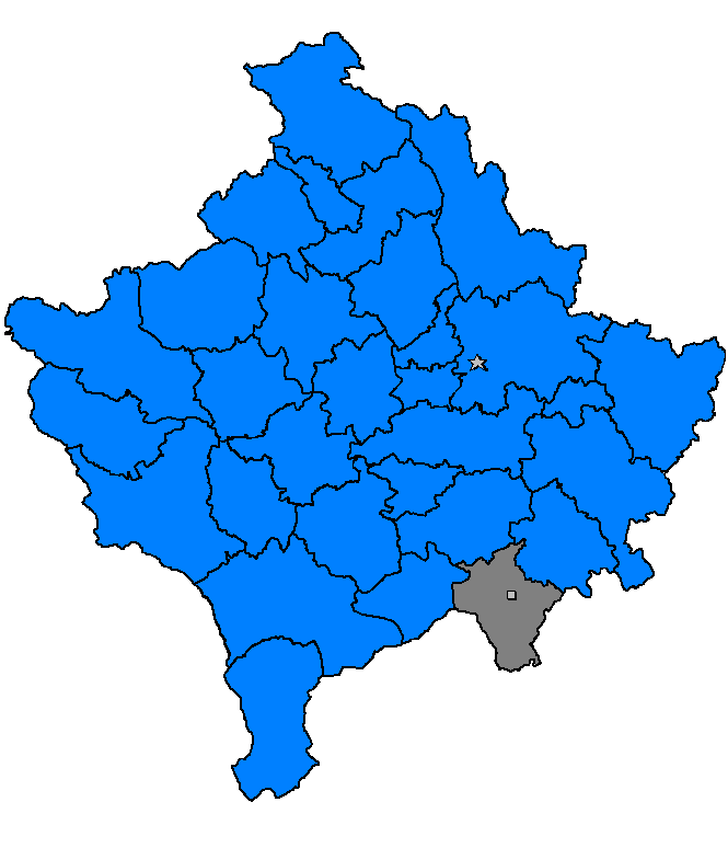 Kaçanik, Kosovë 2006